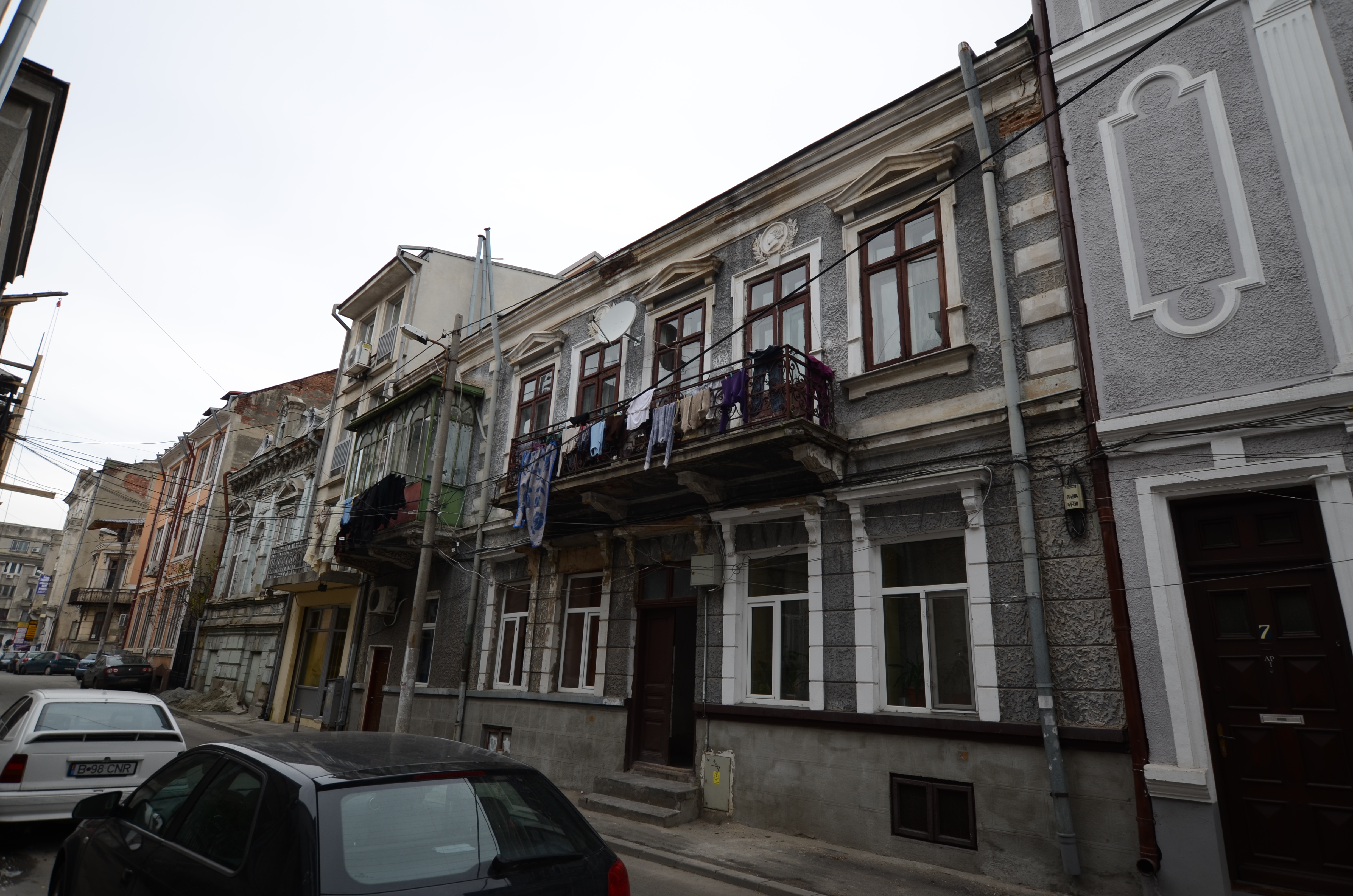 Casă, Str. Pătrașcu Vodă nr. 5, București